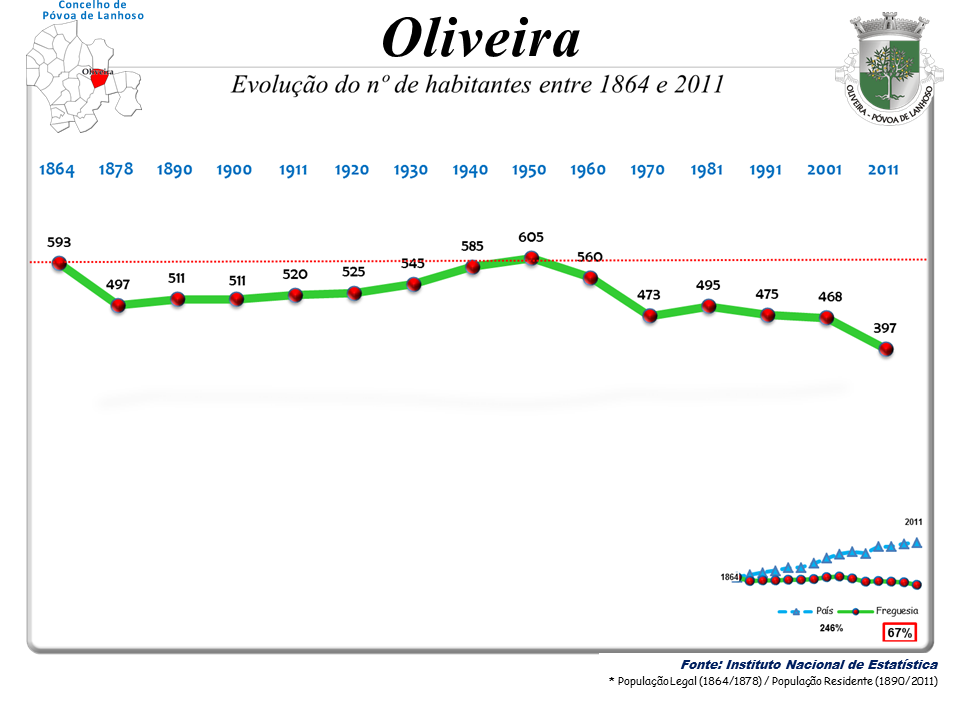 Censos 1864/2011